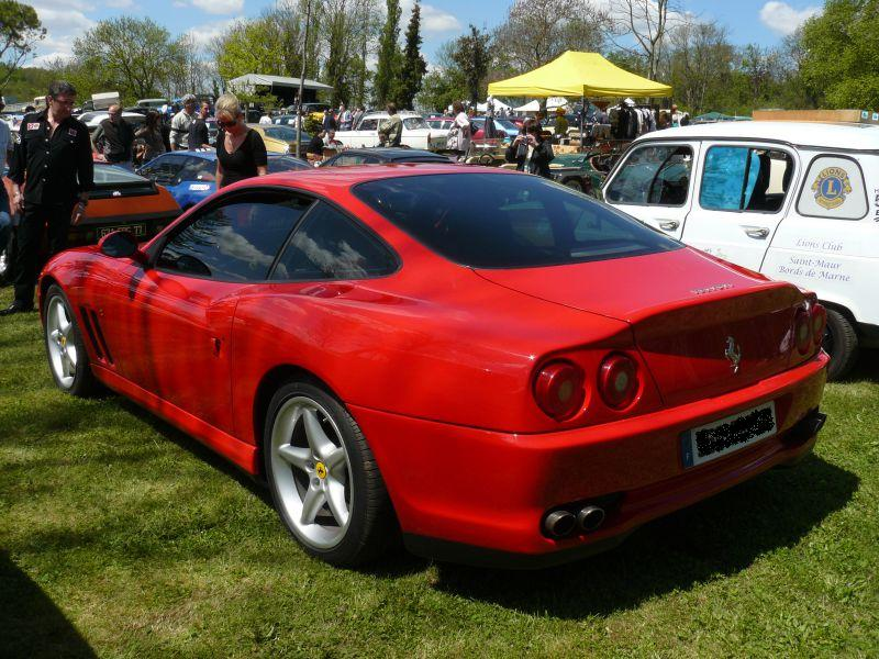 Photo prise à Chelles le 1er Mai 2012